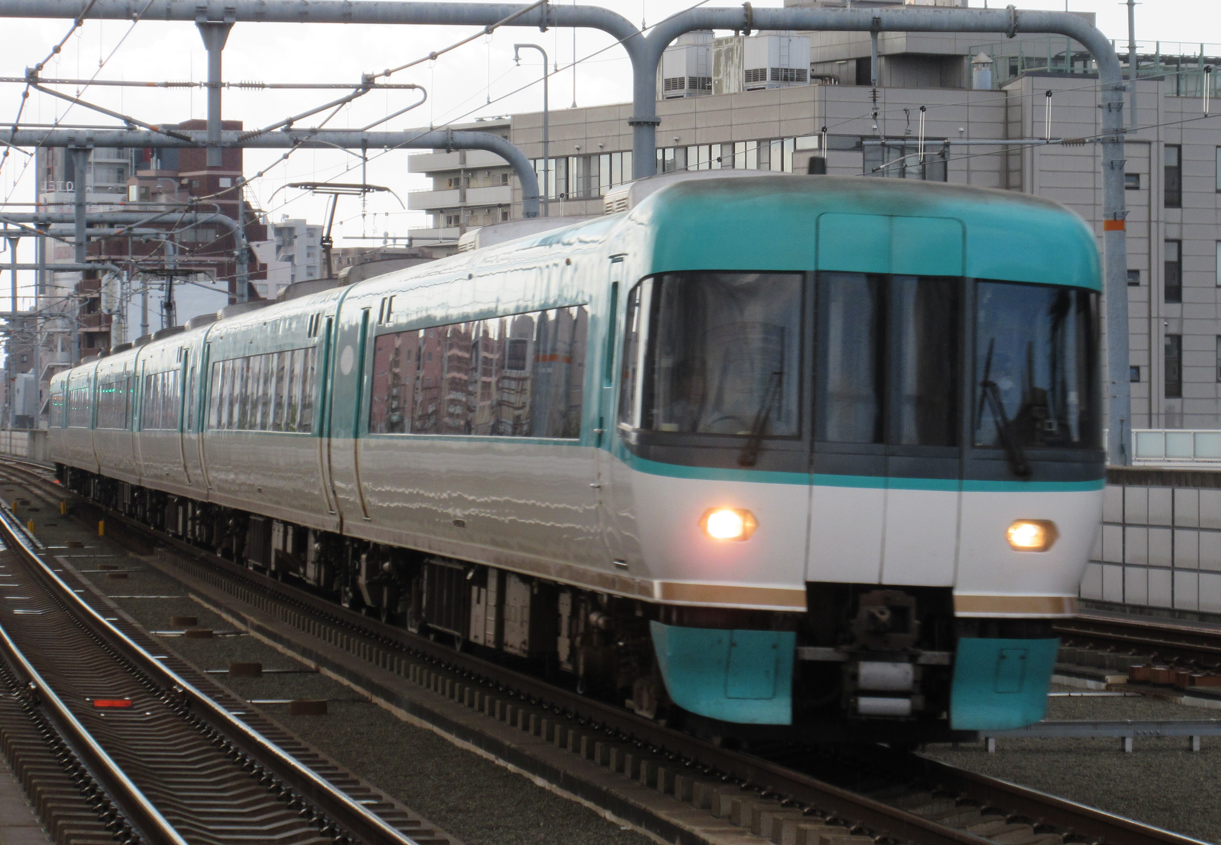 JR西日本283系 B602編成 (鶴ケ丘駅にて)